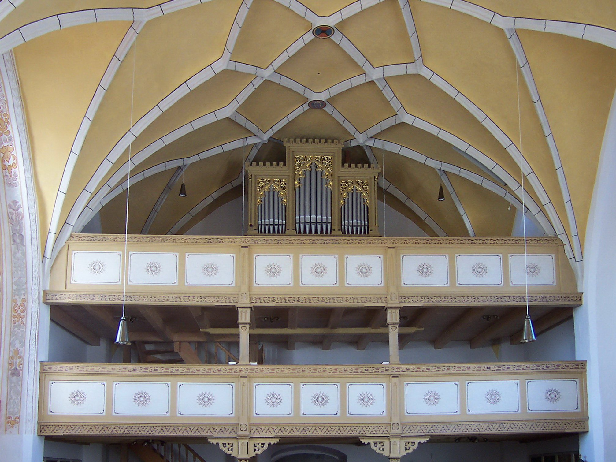 Landshut, Frauenberg 14. Katholische Kirche St. Mariä Heimsuchung. Die gotischen Netzgewölbe reichen bis über die zweigeschossige Empore. Orgel auf der oberen Empore.